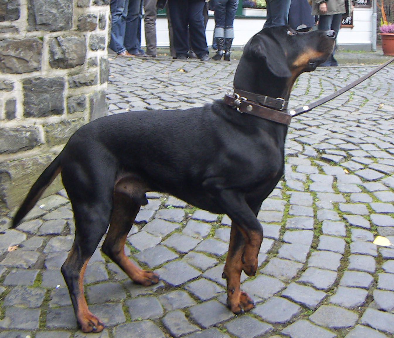 Brandlbracke